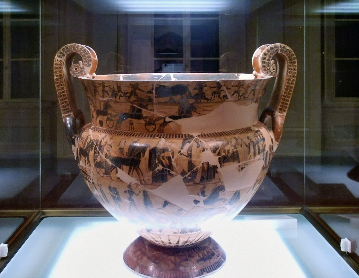 Athenian volute-krater.